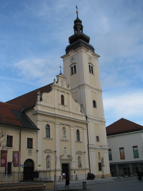 Crkva Sv. Nikole i Franjevački samostan u Čakovcu